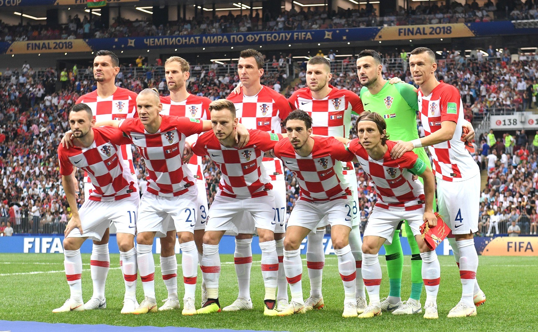 Стартовый состав сборной Хорватии перед финалом чемпионата мира 2018 в России